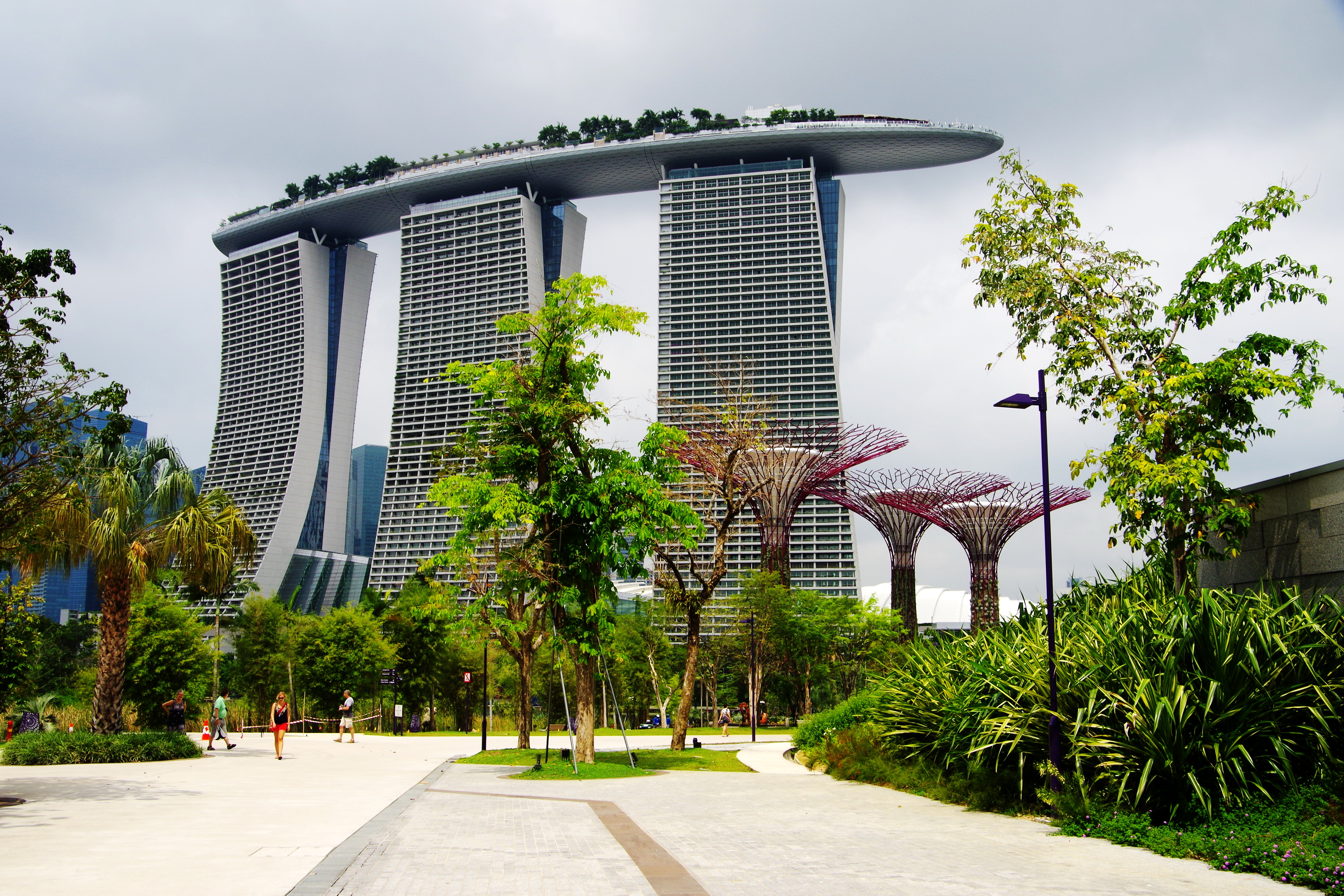 Marina Bay Sands Hotel vom Bay South Garden gesehen